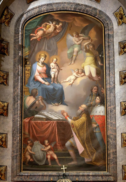 Líceumi kápolna főoltára Az oltárképet Hesz János festette 1813-ban; rajta szent István király imádkozik a Magyarok Nagyasszonyaként tisztelt Szűz Mária képe előtt. /wikipedia/ (Eger)Stephen I of Hungary praying before Virgin Mary (János Hesz, 1813)